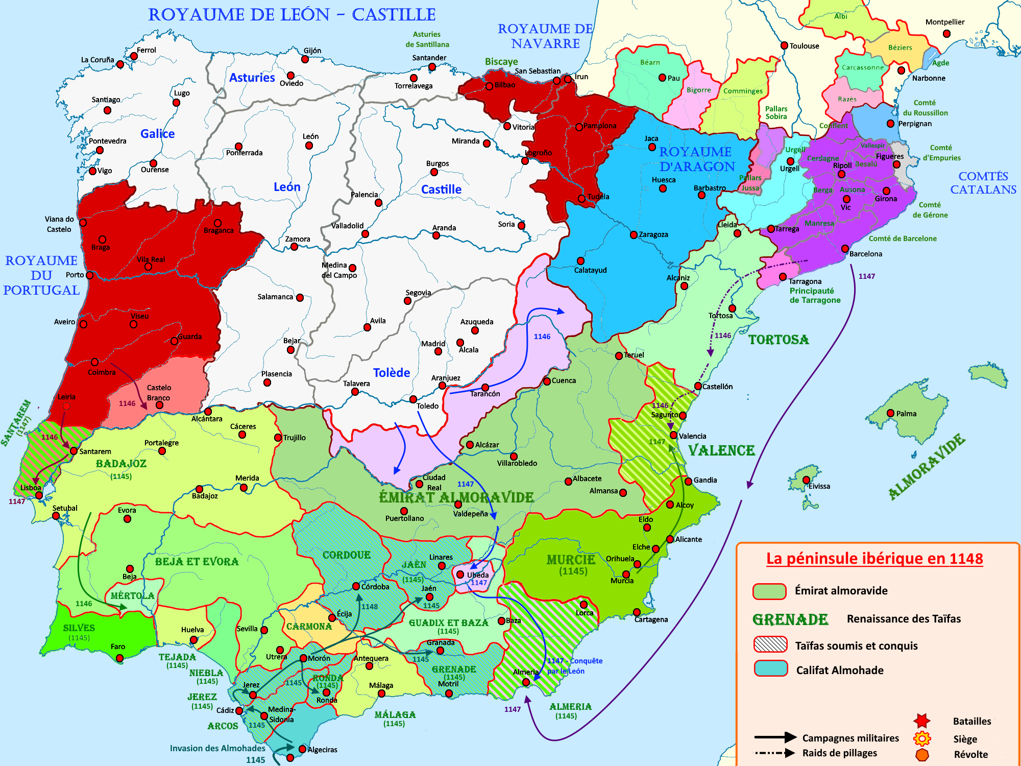 Carte de la péninsule ibérique en 1148 illustrant l'effondrement des Almoravides, l'essor des Taïfas, l'invasion almohade et la croisade contre Alméria